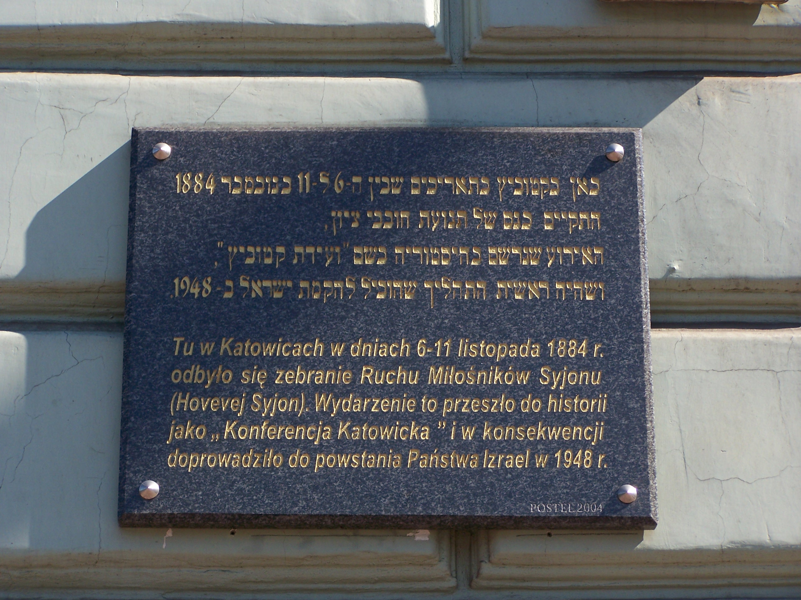 Tablica pamiątkowa na ul. Młyńskiej w Katowicach.